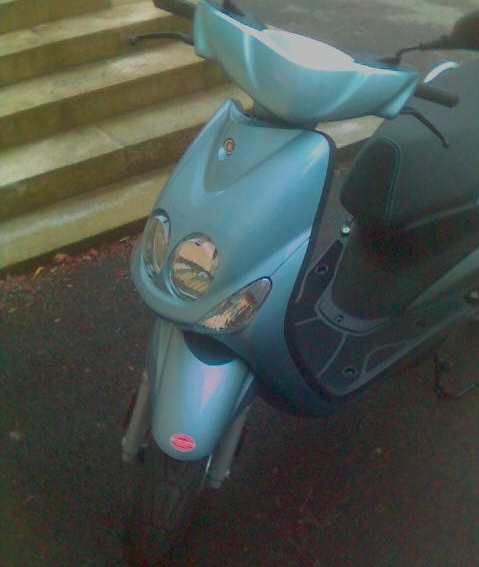 Yamaha Neo’s 50 Frontansicht Facelift Neptune Blue